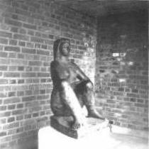 Bundesgartenschau 1957 in Köln - Plastik